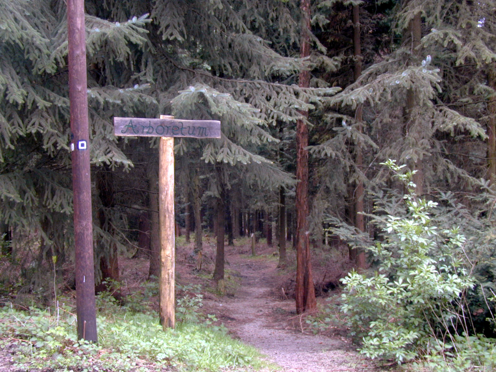 Eingang zum Arboretum Burgholz, Wuppertal